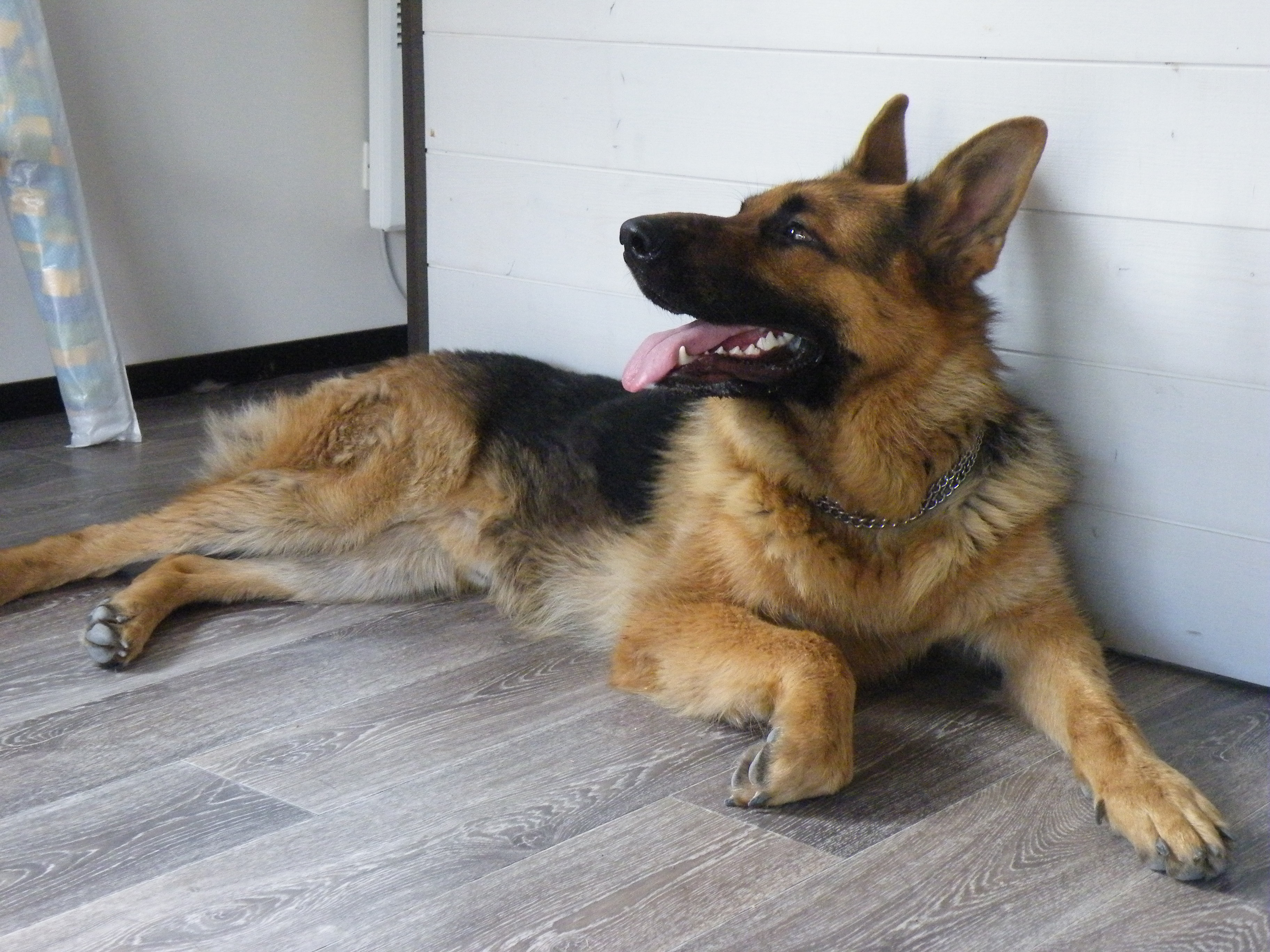 Un Berger Allemand après un footing.